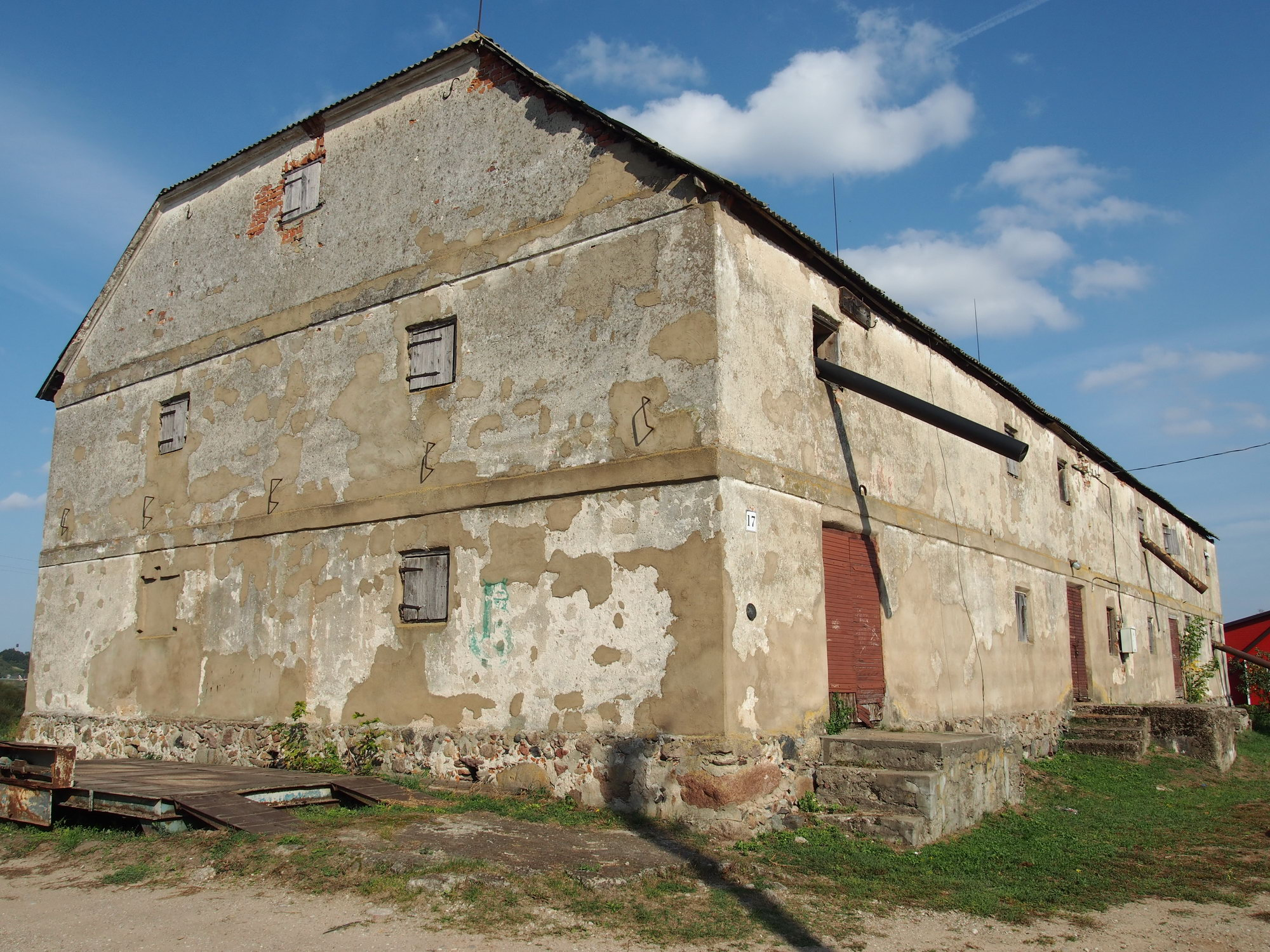 XIX a. pab. statinys – ant akmeninių pamatų stovintis dviejų aukštų grūdų sandėlis, vietinių gyventojų vadinamas „Špykėre“. Jis priklausė pirkliams ir buvo skirtas supirktiems javams laikyti. Iš čia grūdus Nemunu plukdydavo į Vokietiją.